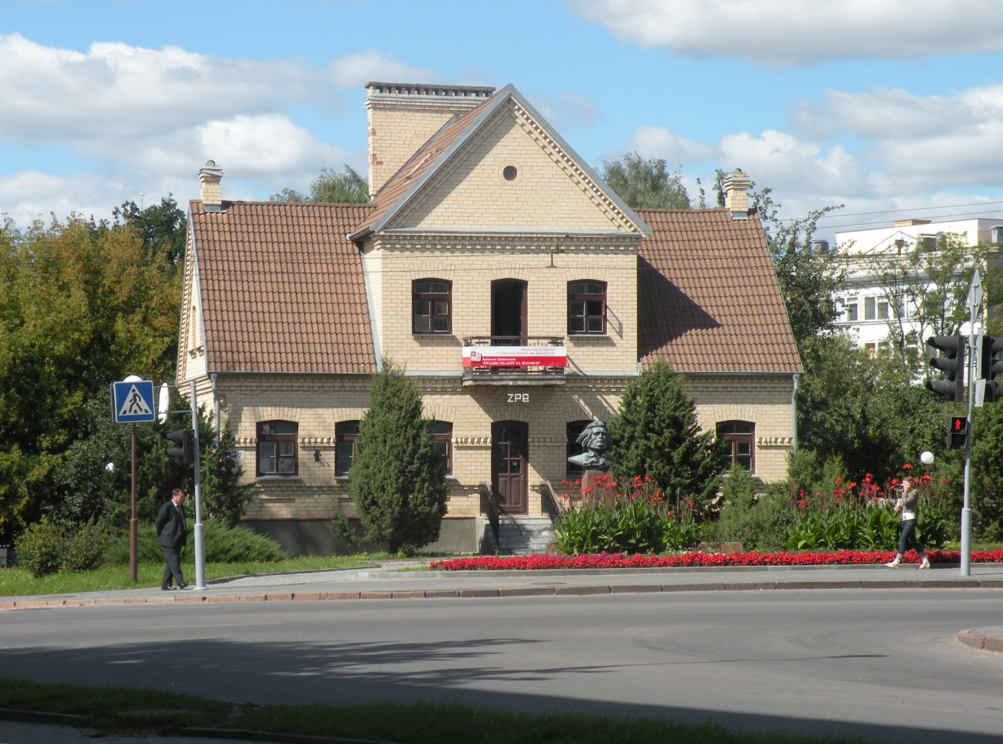 Здание по адресу ул. Дзержинского, 32 (Гродно, Беларусь). В здании расмещаются Польская городская библиотека и ОО "Союз поляков на Беларуси"